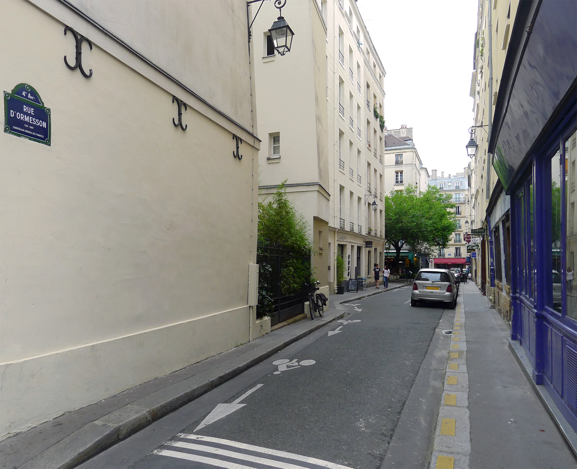 Rue d'Ormesson - Paris IV